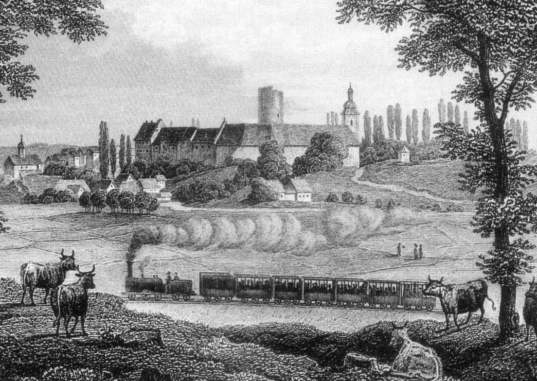 Burgruine Vienenburg